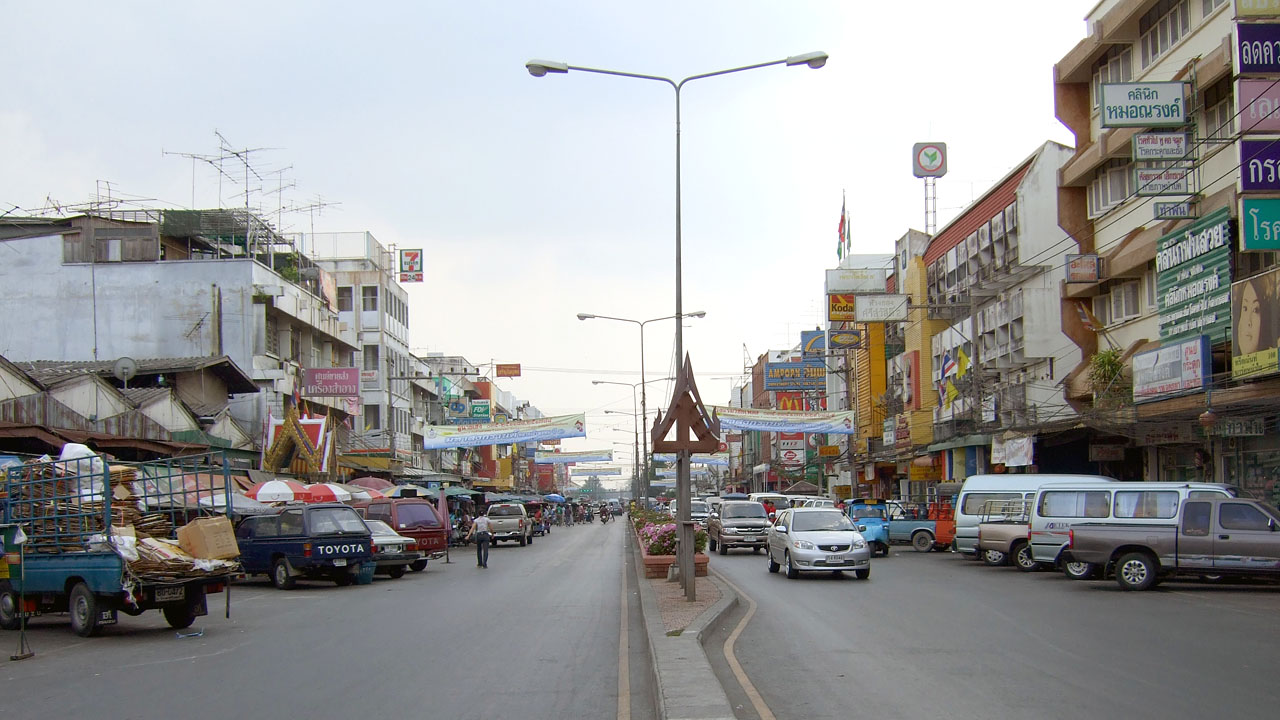 Naresuan-Road, Ayutthaya, Thailand